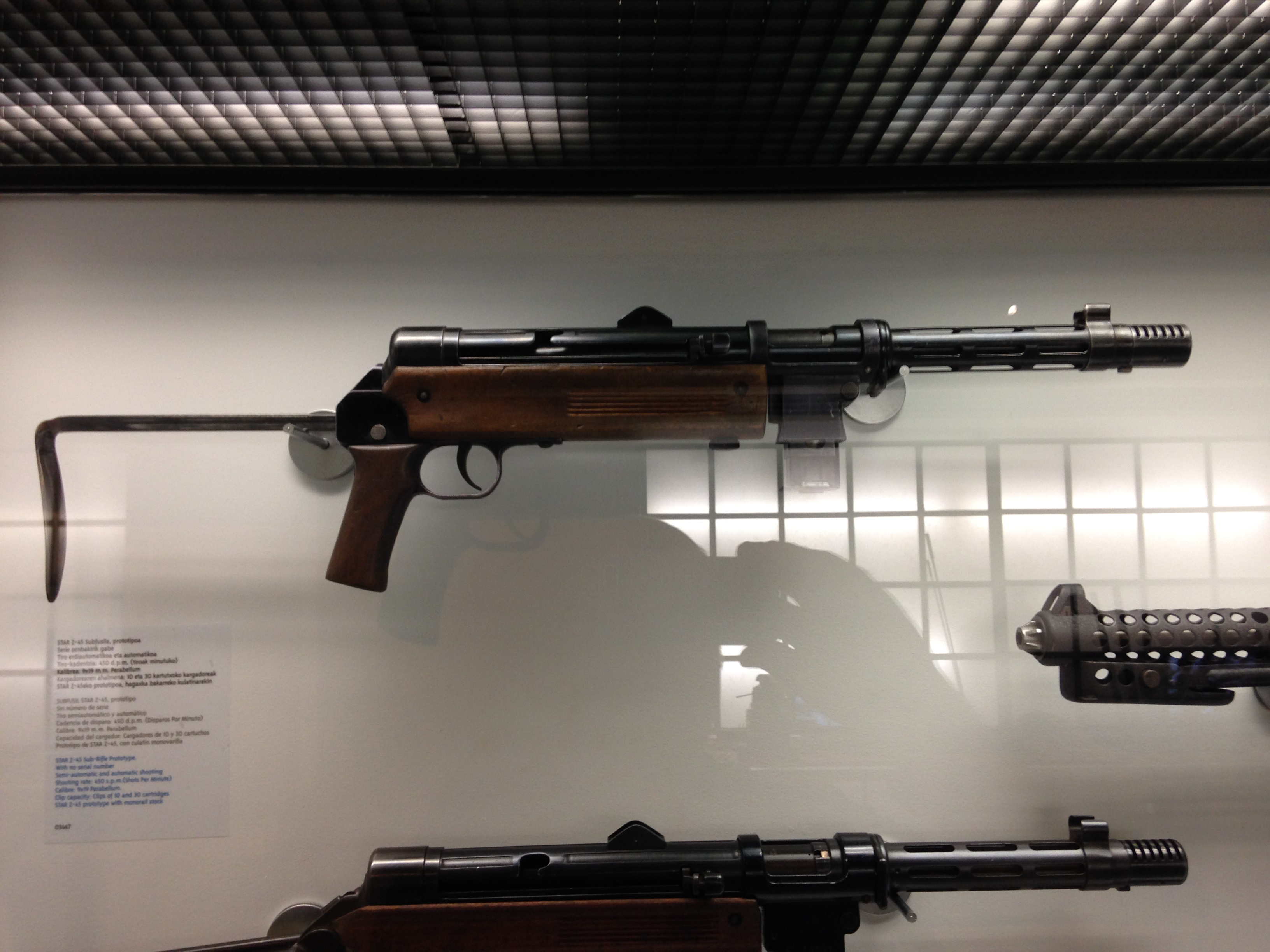 Museo de la Industria Armera de Éibar. Subfusil Z-45 fabricado por STAR de Eibar.